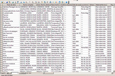 screenshot de um arquivo museológico digital